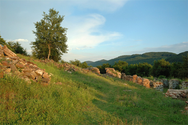 Траянови врата, Ихтиман; 2007 Пламен Ташев